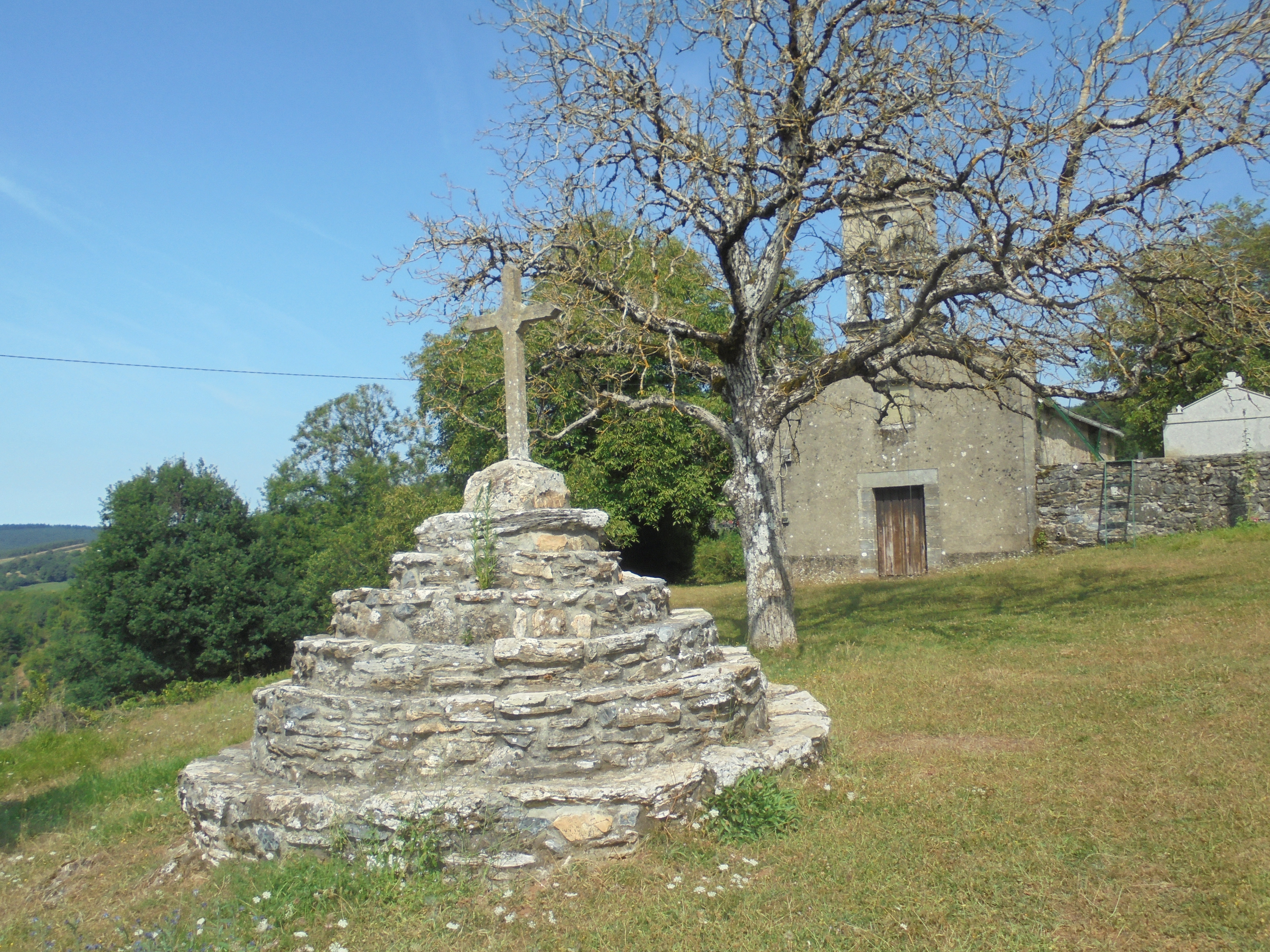 Igrexa parroquial de Sixirei